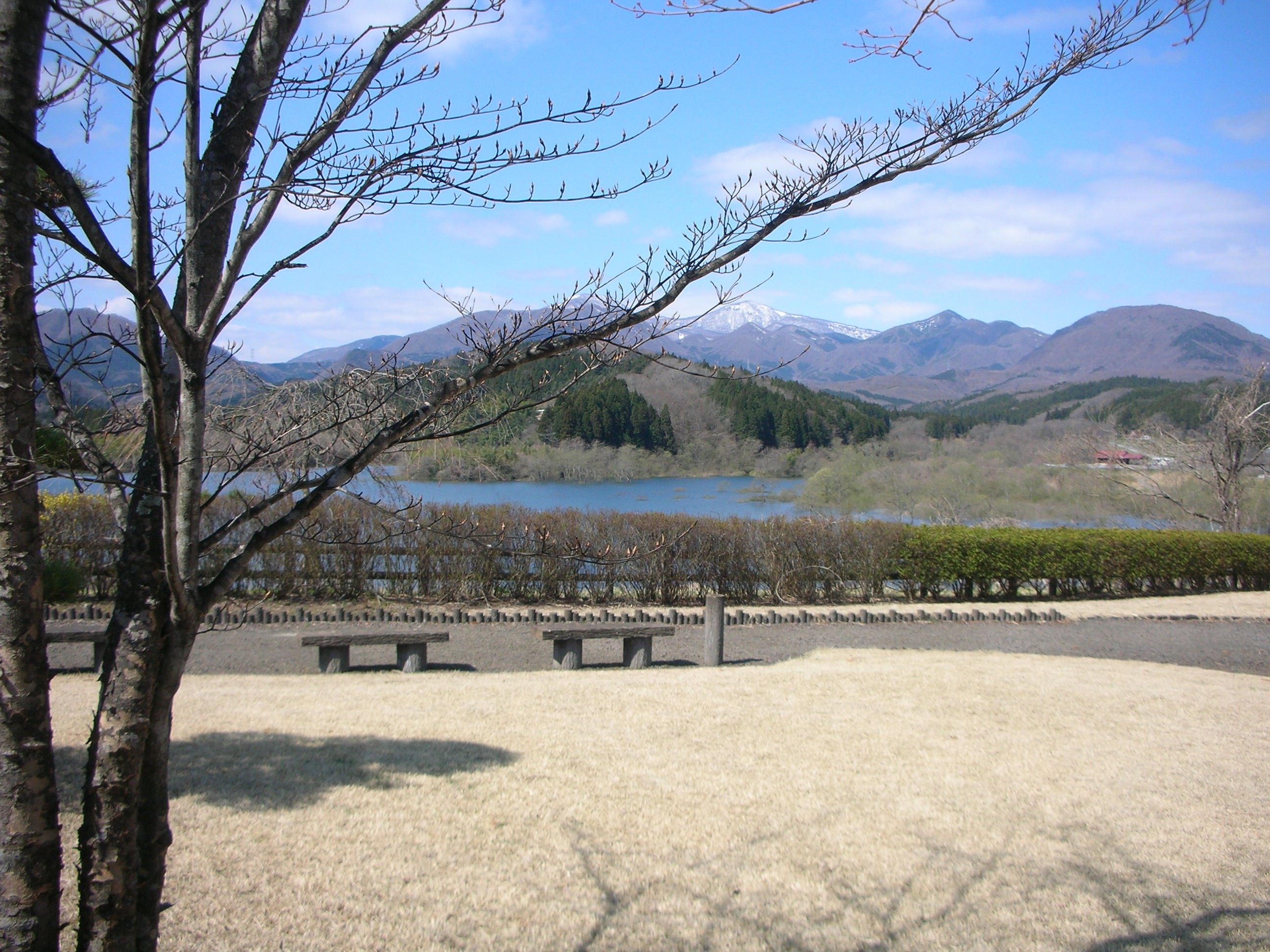 七ツ森ふれあい